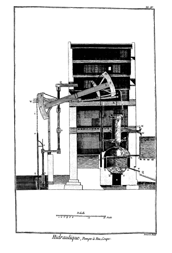 L’Encyclopédie ou Dictionnaire raisonné des sciences, des arts et des métiers : planche Hydraulique